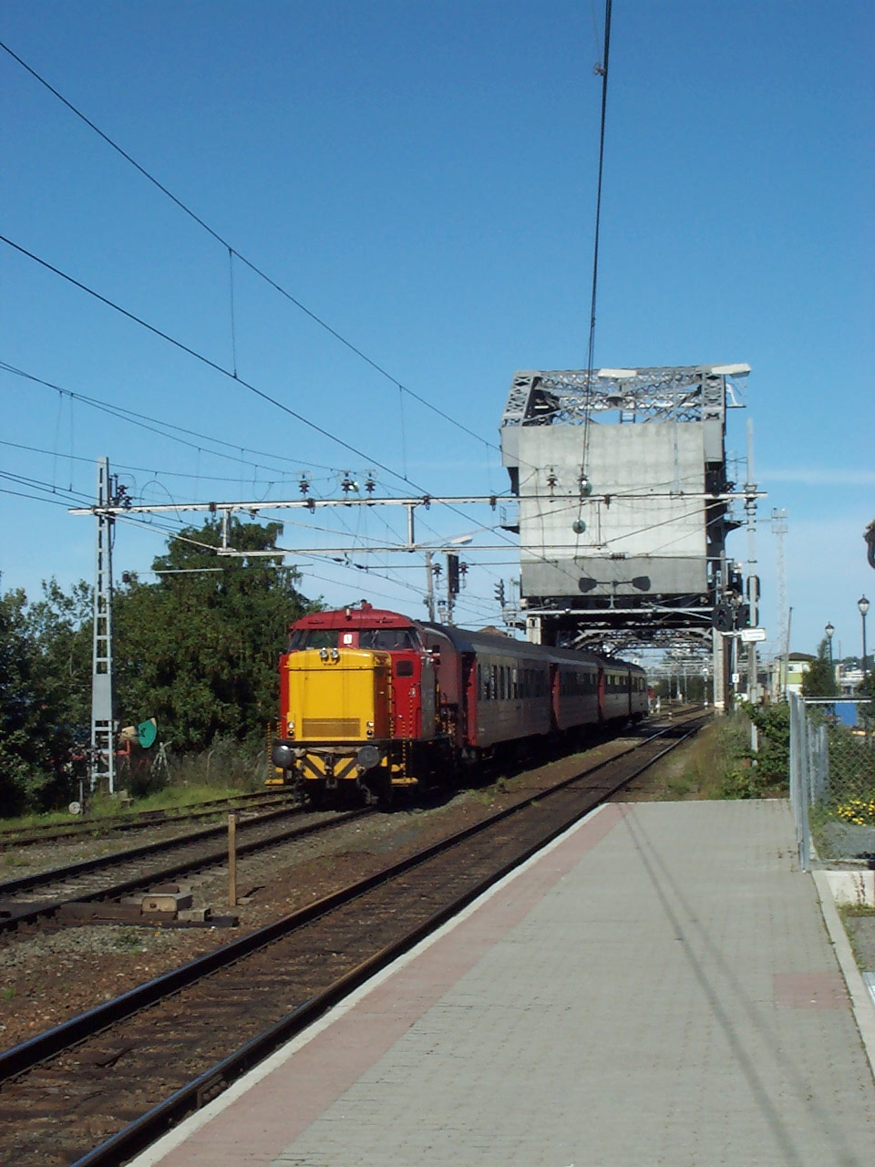 skansen